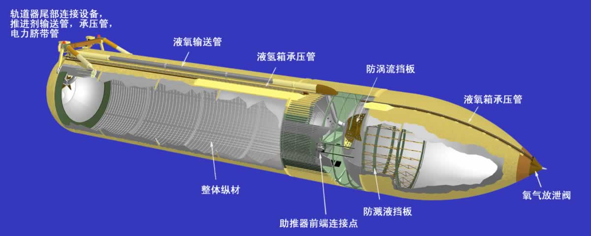 中文（中国大陆）: 航天飞机外储箱剖面图